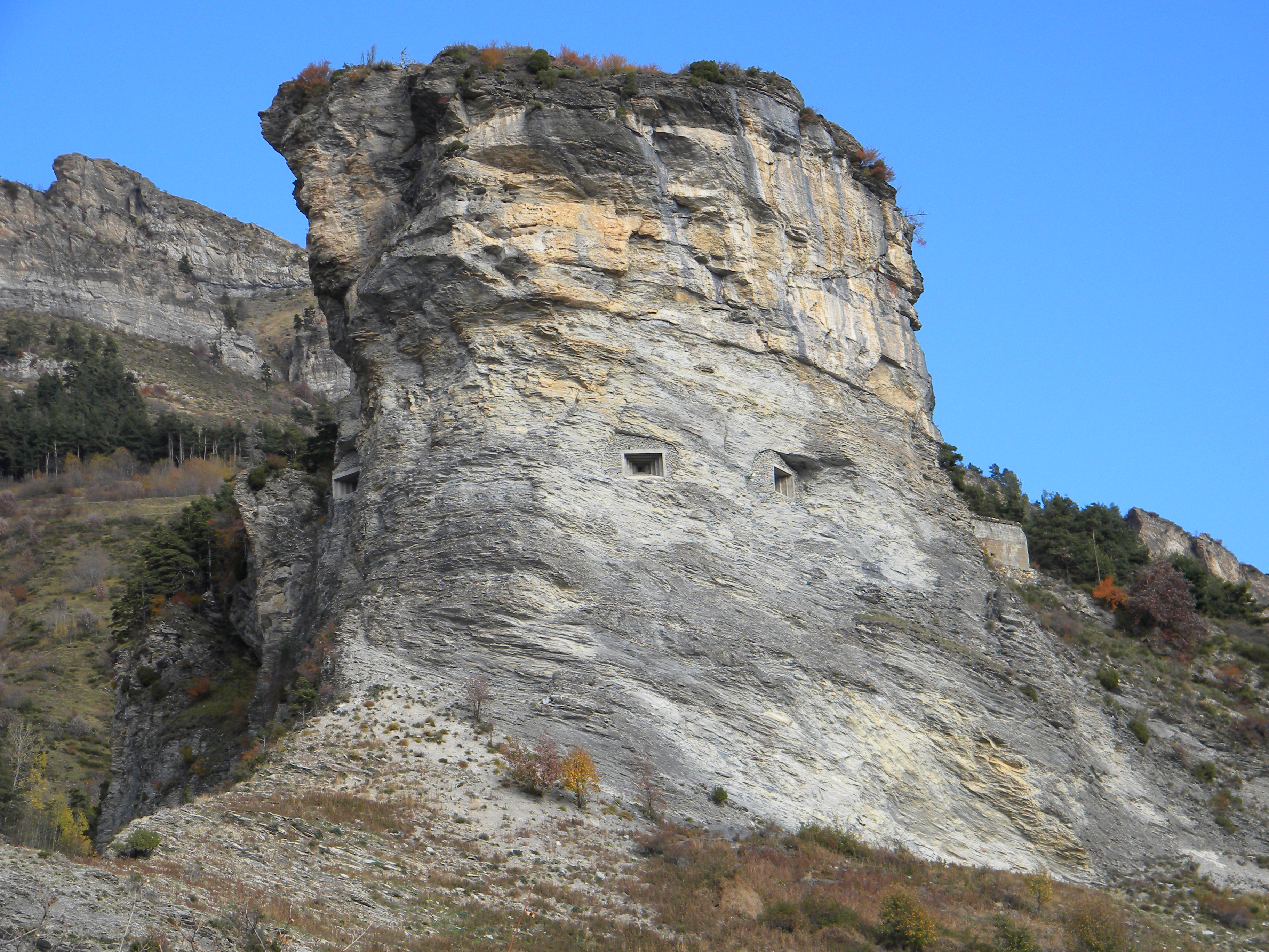 Manfredi Roberto (Riotforlife), personale, vista di Castel Tournou dal sentiero